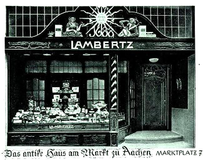 Zentrale der Firma Lambertz, Markt Nr.7 in Aachen um 1900